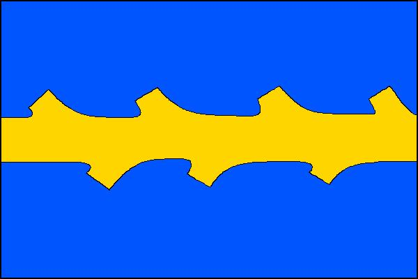 Vlajka obce Provodov-Šonov